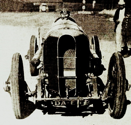 René Thomas sur Sunbeam 18,3 l, vainqueur de la côte de Gaillon 1920 - La Vie au Grand Air, 15 décembre 1920, p.34